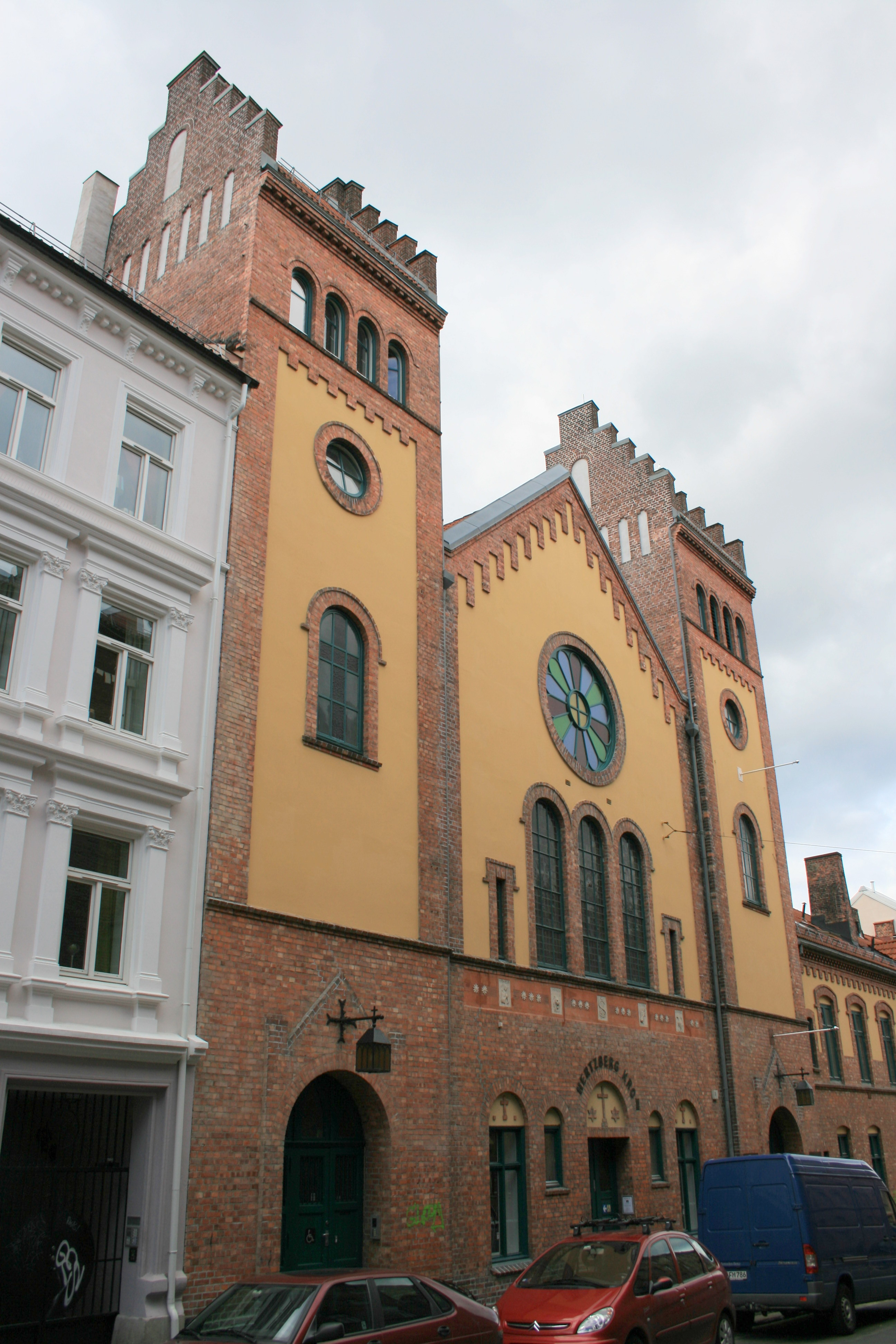 Norsk (bokmål): Tøyen kirke er en langkirke fra 1908 i Oslo kommune. Adresse Herslebs gate 43.